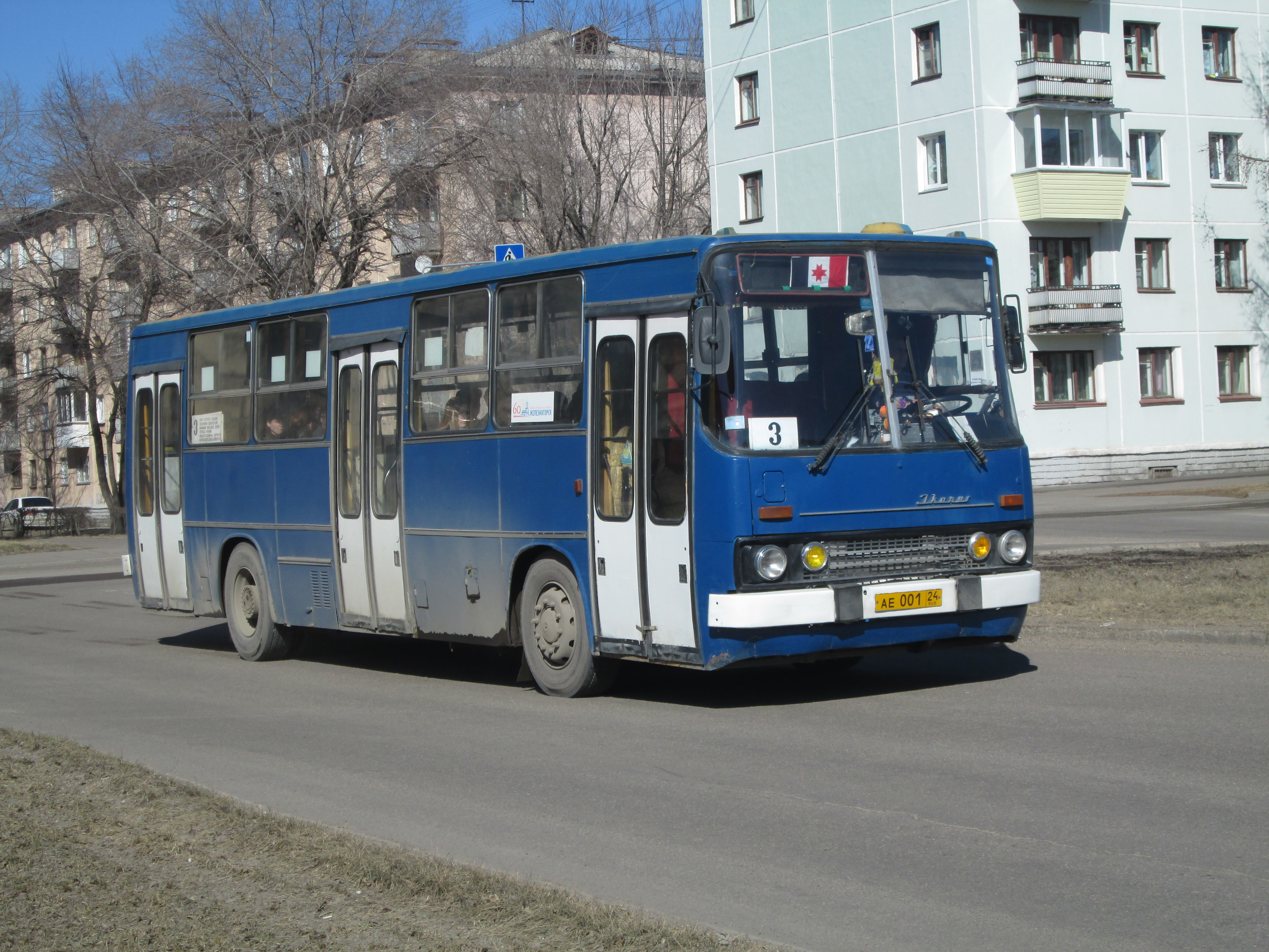 Последний Икарус 260 1985 г.в в Железногорске